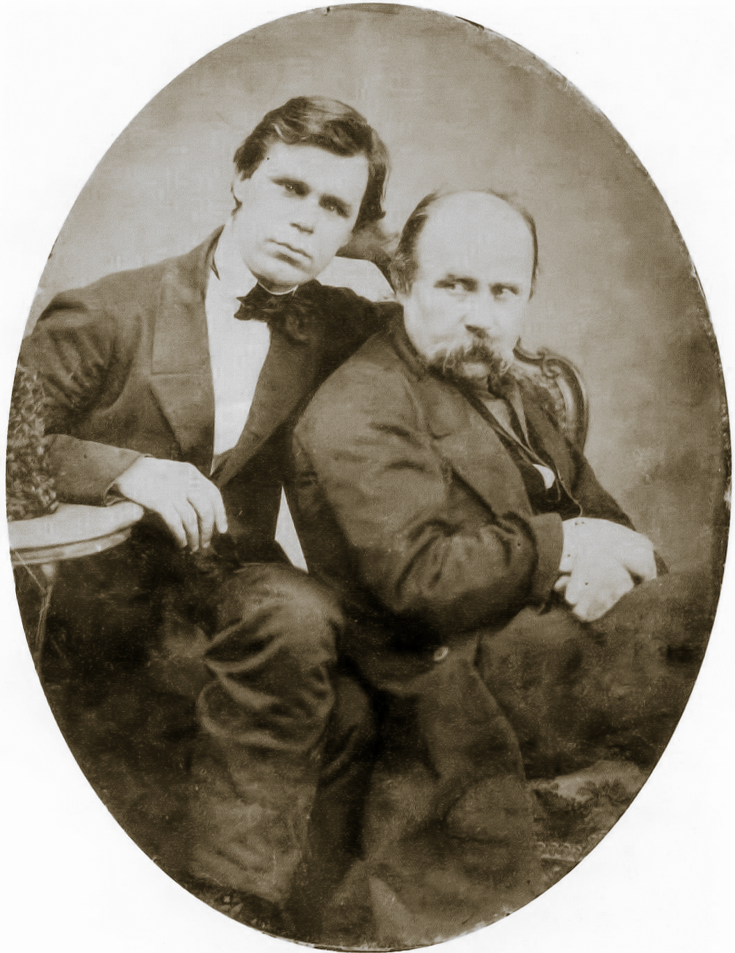 Тарас Шевченко і Григорій Честахівський. Фотограф Микола Досс. Фото 1860 р. Санкт-Петербург. Фотографія. 18,9 × 14,7. Національний музей Тараса Шевченка, № ф-73. Григорій Честахівський — художник, приятель Шевченка. У 1861 році супроводжував на Україну труну з тілом поета, впорядкував могилу Шевченка на Чернечій горі.